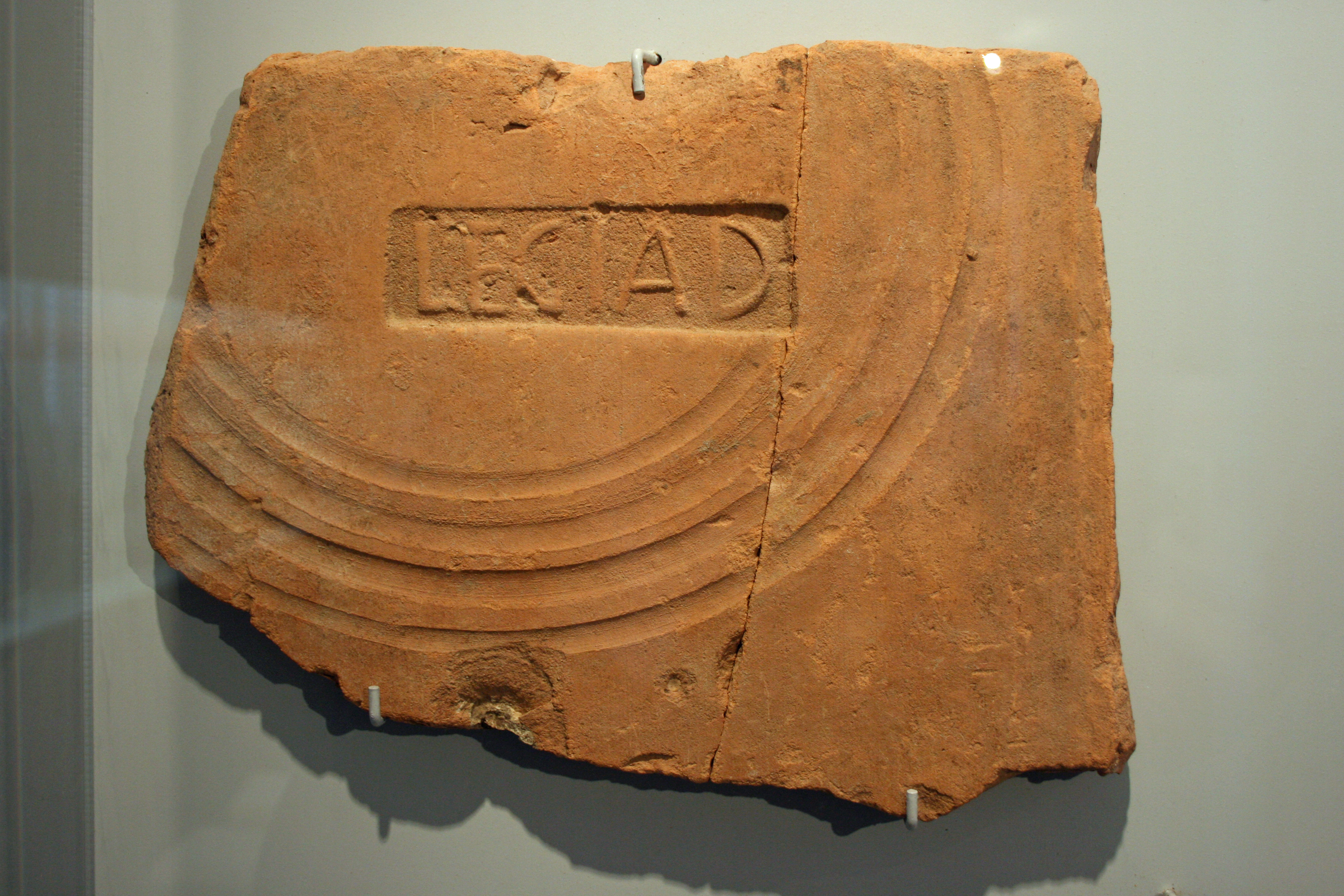 Ziegelstempel der Legio I adiutrix im Terra Sigillata-Museum Rheinzabern.